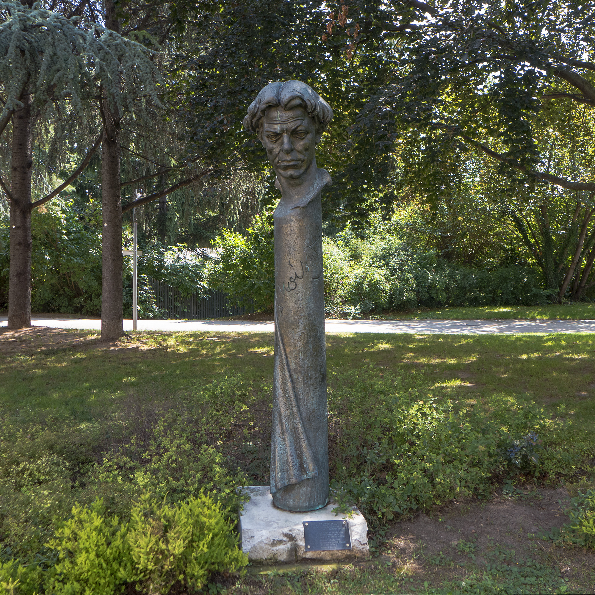 Cholewkapark in Wien 22